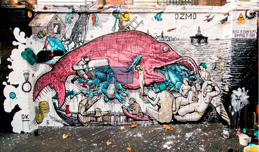 prova prova